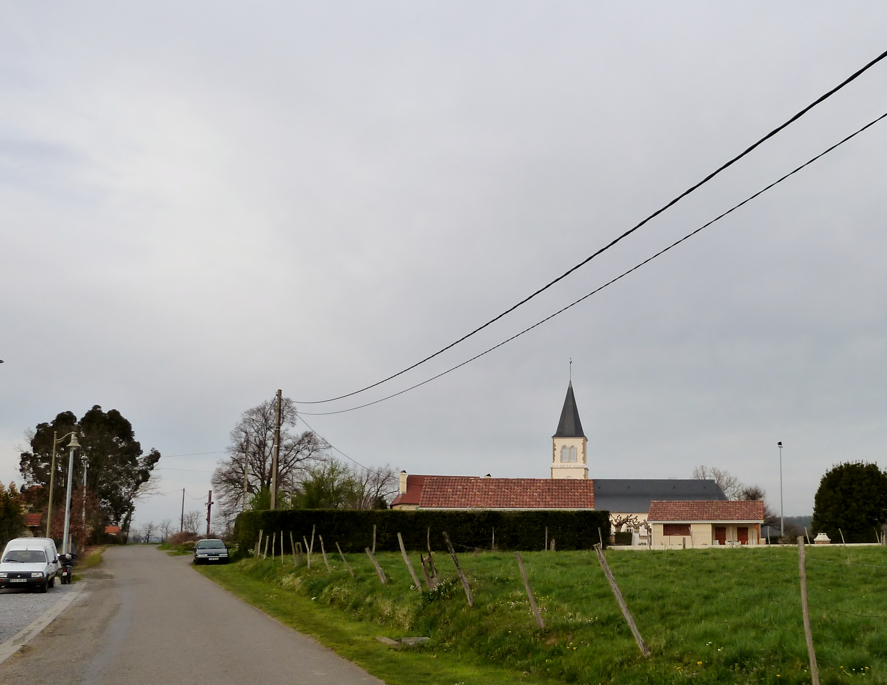 Église de Baliracq